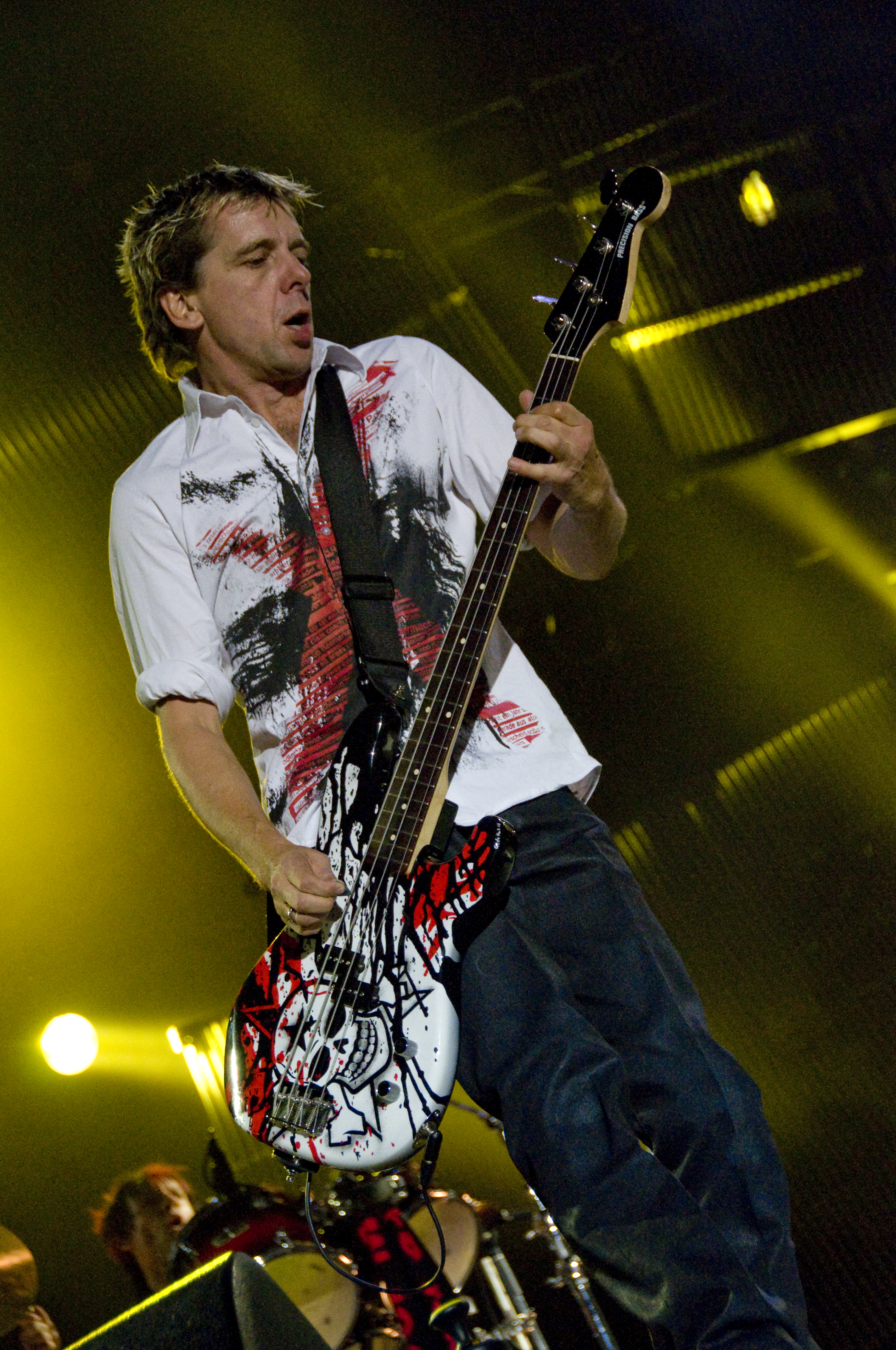 Die Bühne betraten die Toten Hosen kurz nach 21 Uhr. Die Punk-Veteranen spielten ihre grossen Hits, darunter natürlich «Alles aus Liebe», «Hier kommt Alex» und «Paradies». Feierabend machten die Düsseldorfer nach rund zwei Stunden. Das Publikum war glücklich.